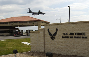 Bild: Einfahrt Mc Dill AFB